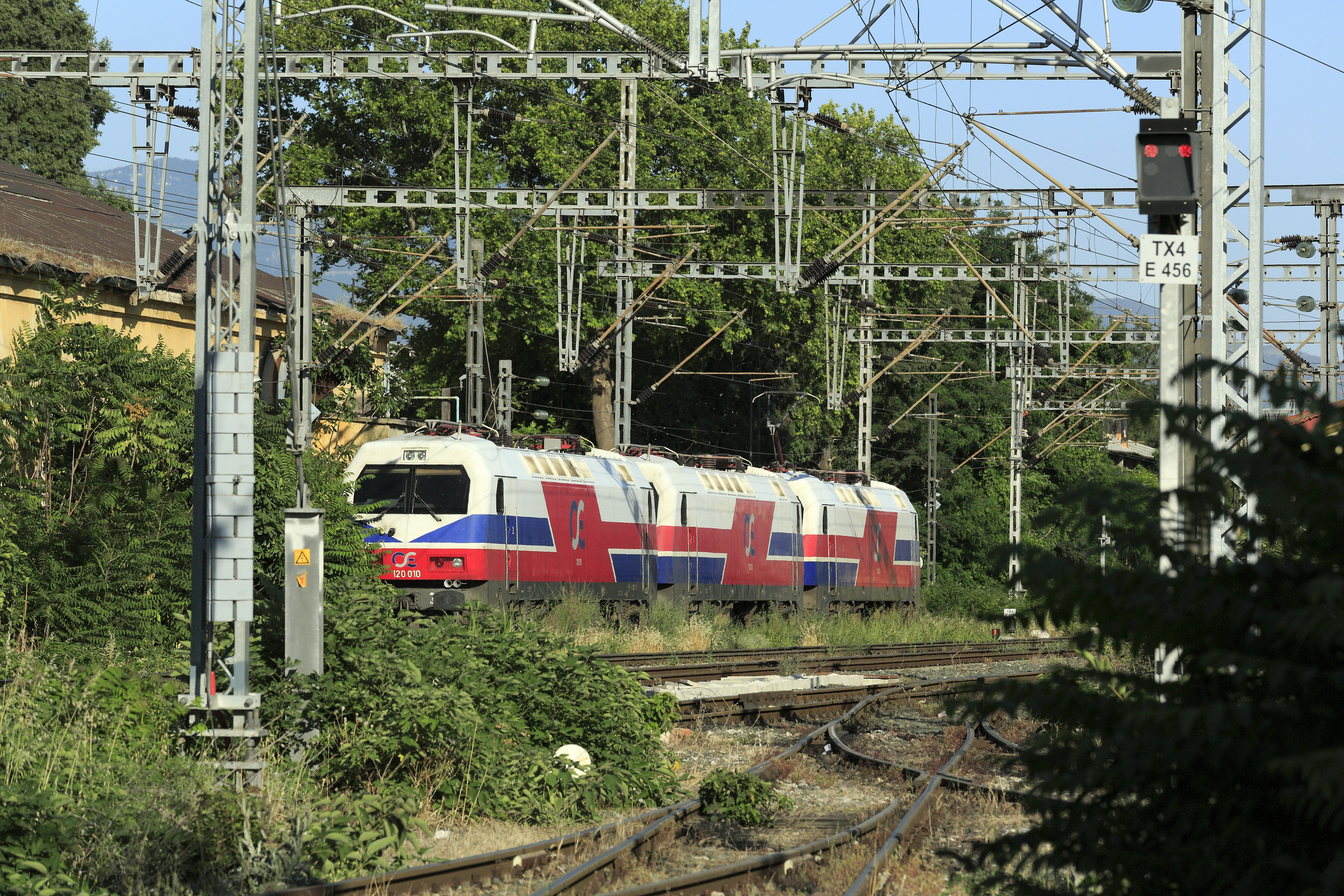 Wendegleis auf der Nordseite der Bahnanlagen in der Stadt Thessaloníki. Das Lichtsperrsignal mit Lichtleitoptiken im Vordergrund ist sichtbar nach deutschem Vorbild entstanden.